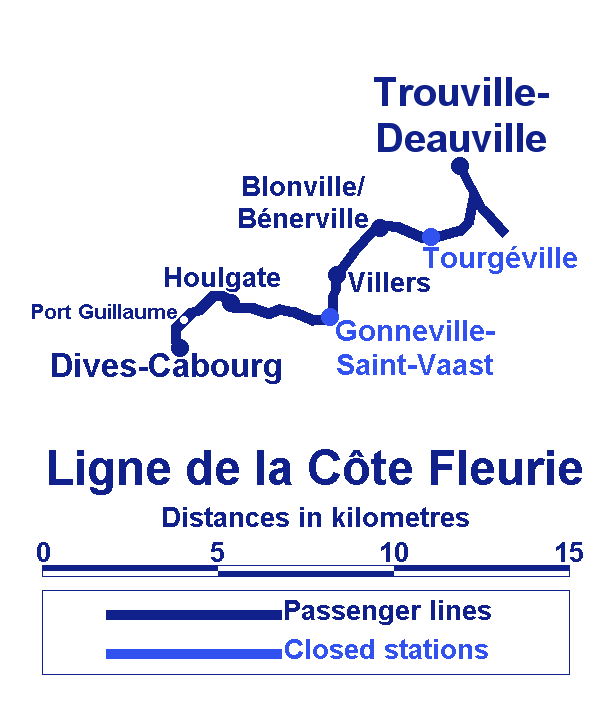 Plan of the ligne de la Côte Fleurie in Basse-Normandie, France.